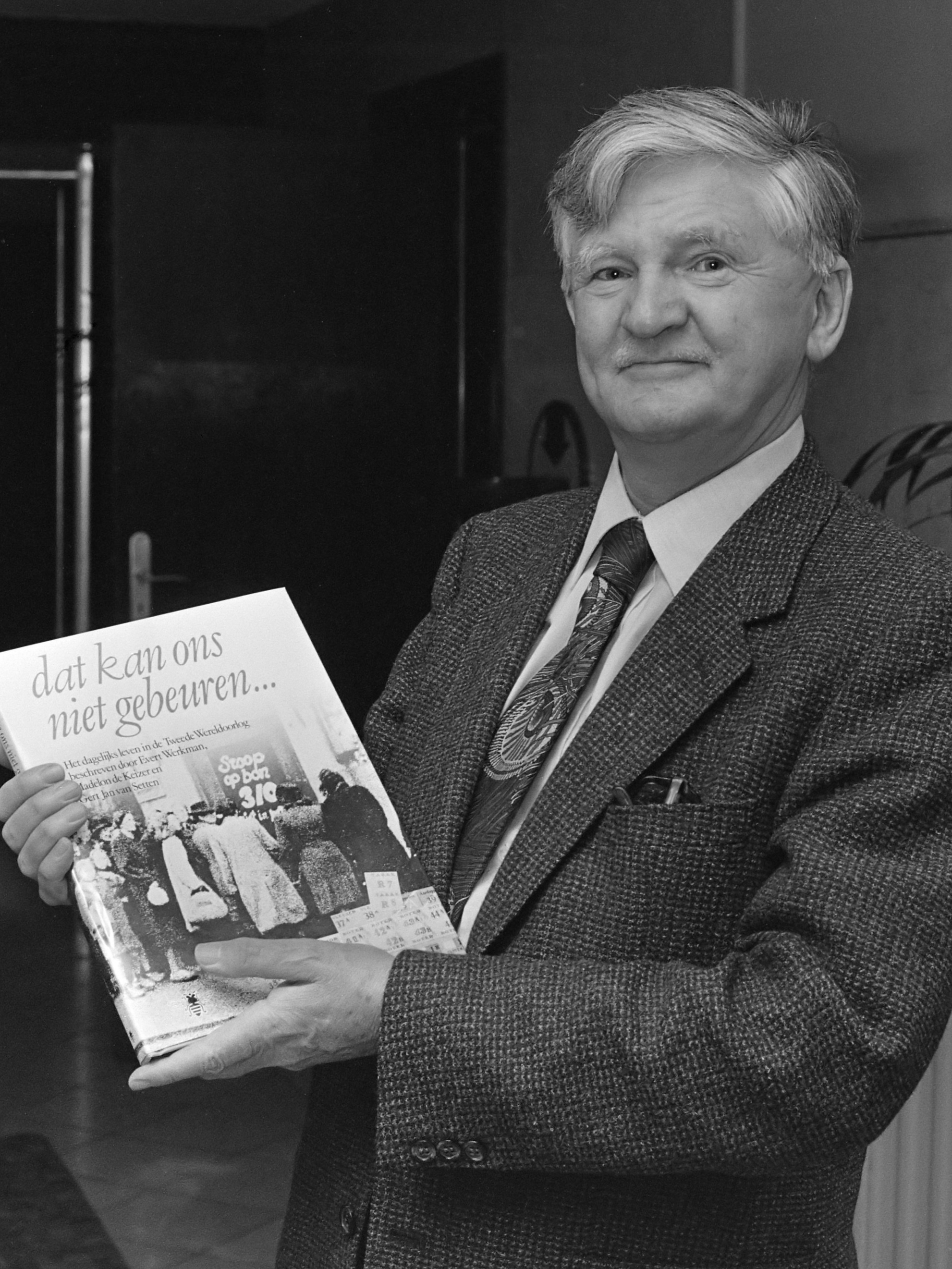 Presentatie boek van de maand "Dat kan ons niet gebeuren; Evert Werkman met boek 24 april 1980